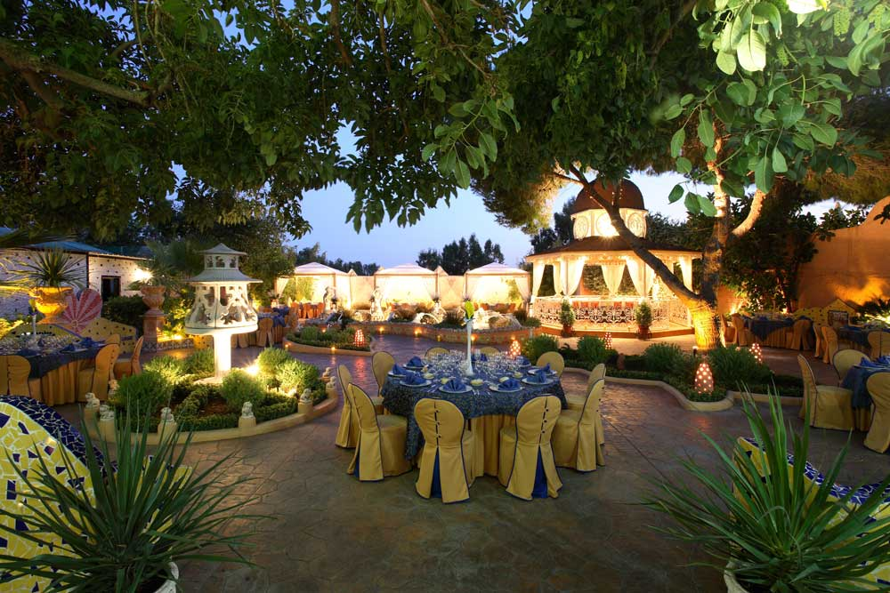 Salones de boda en Valencia